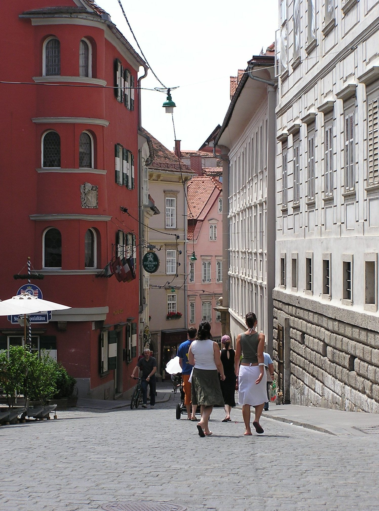 Abschnitt der Sporgasse (Graz)